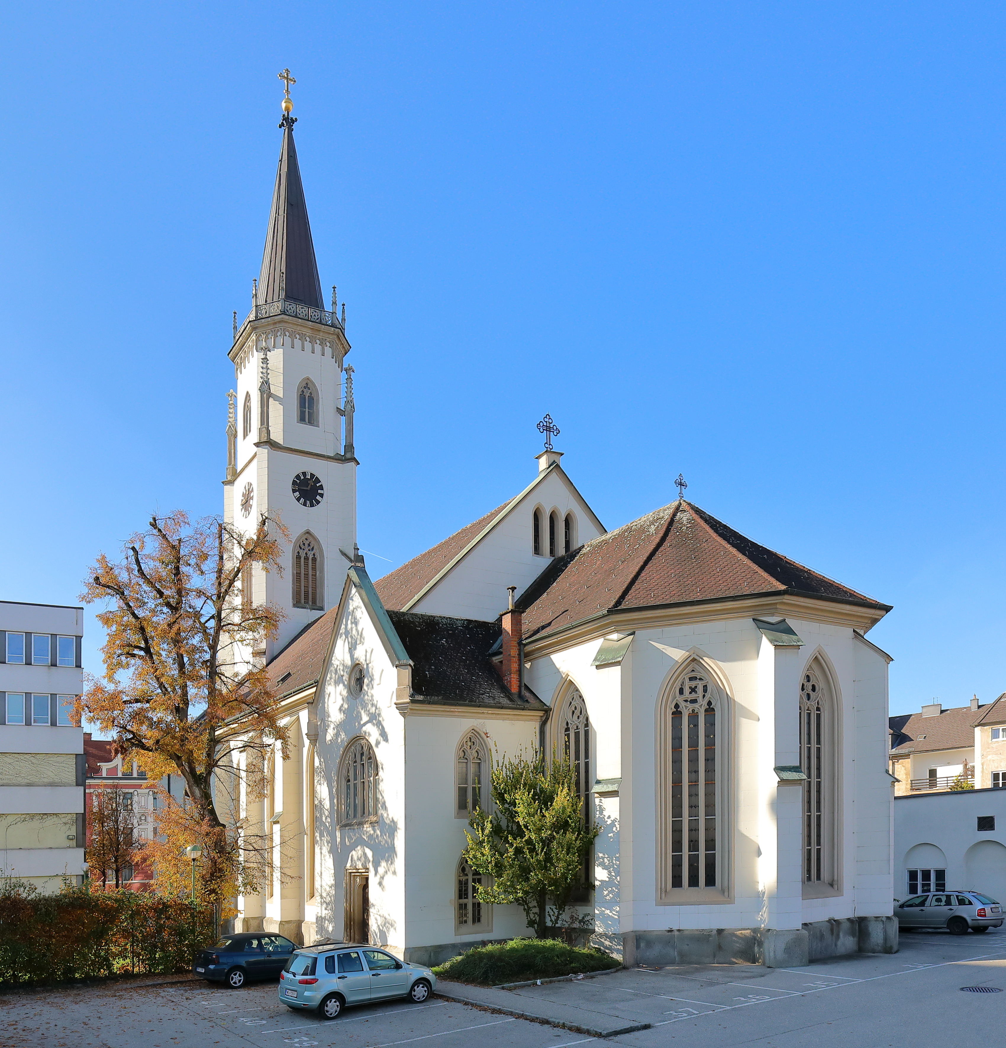 Ostansicht der evangelischen Christuskirche in der oberösterreichischen Stadt Wels. Sie war die 1. evangelische Kirche Österreichs, die einen Turm mit Geläute hatte.Die Kirche wurde von 1849 bis 1852 nach Plänen des Nürnberger Carl Alexander Heideloff unter der Bauleitung des Hannoveraner Architekten Michael Geiger im neogotischen Stil errichtet. Das Langhaus ist dreischiffig und hat fünf Joche. Der 60 Meter hohe Westturm erhielt erst 1860 seine heutige Form.